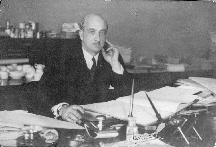 Luis Matte Larrain